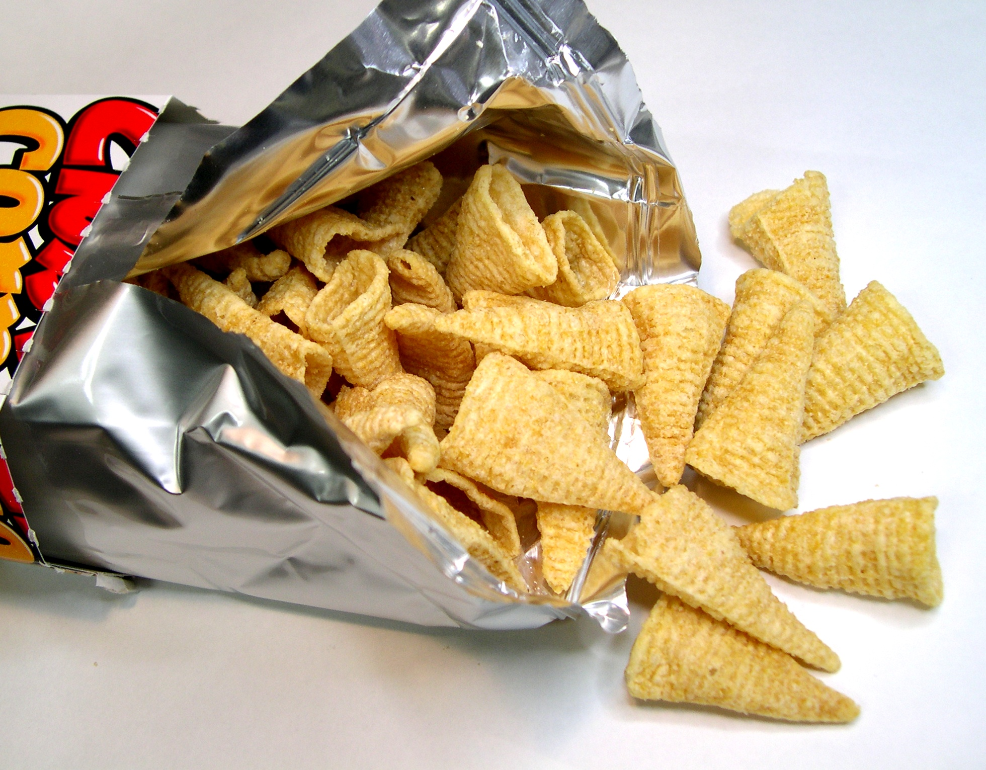 とんがりコーン（焦がしバター醤油味） 内容量：75g 製造者：ハウス食品株式会社SF 原材料：とうもろこし、植物油脂、バターしょう油風味シーズニング、砂糖、食塩、調味料（アミノ酸等）、重曹、香料、酸化防止剤（ビタミンE） 賞味期限：2011年9月17日 希望小売価格：180円（税別） 菓子1個の高さ：4.5cm前後 菓子1個の幅：2.5cm前後 菓子1個の重さ：0.87g（10個平均）